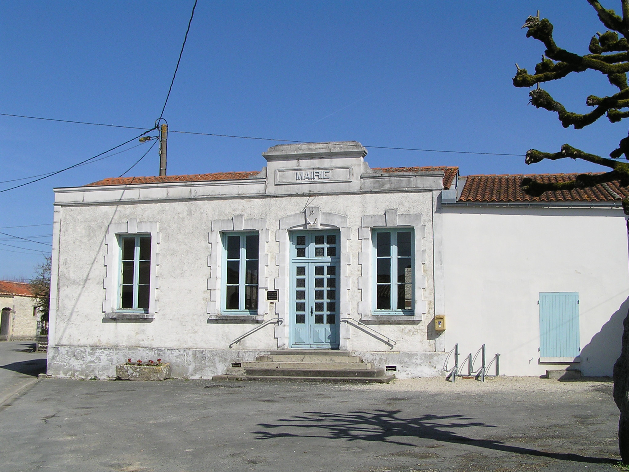 mairie de Bagnizeau